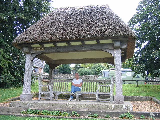 Tolpuddle Martyrs' Memorial Shelter, Tolpuddle Tolpuddle, Dorset, UK.